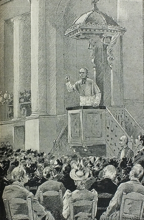 Mgr Freppel prêchant à la chaire de l'Eglise de la Madeleine.